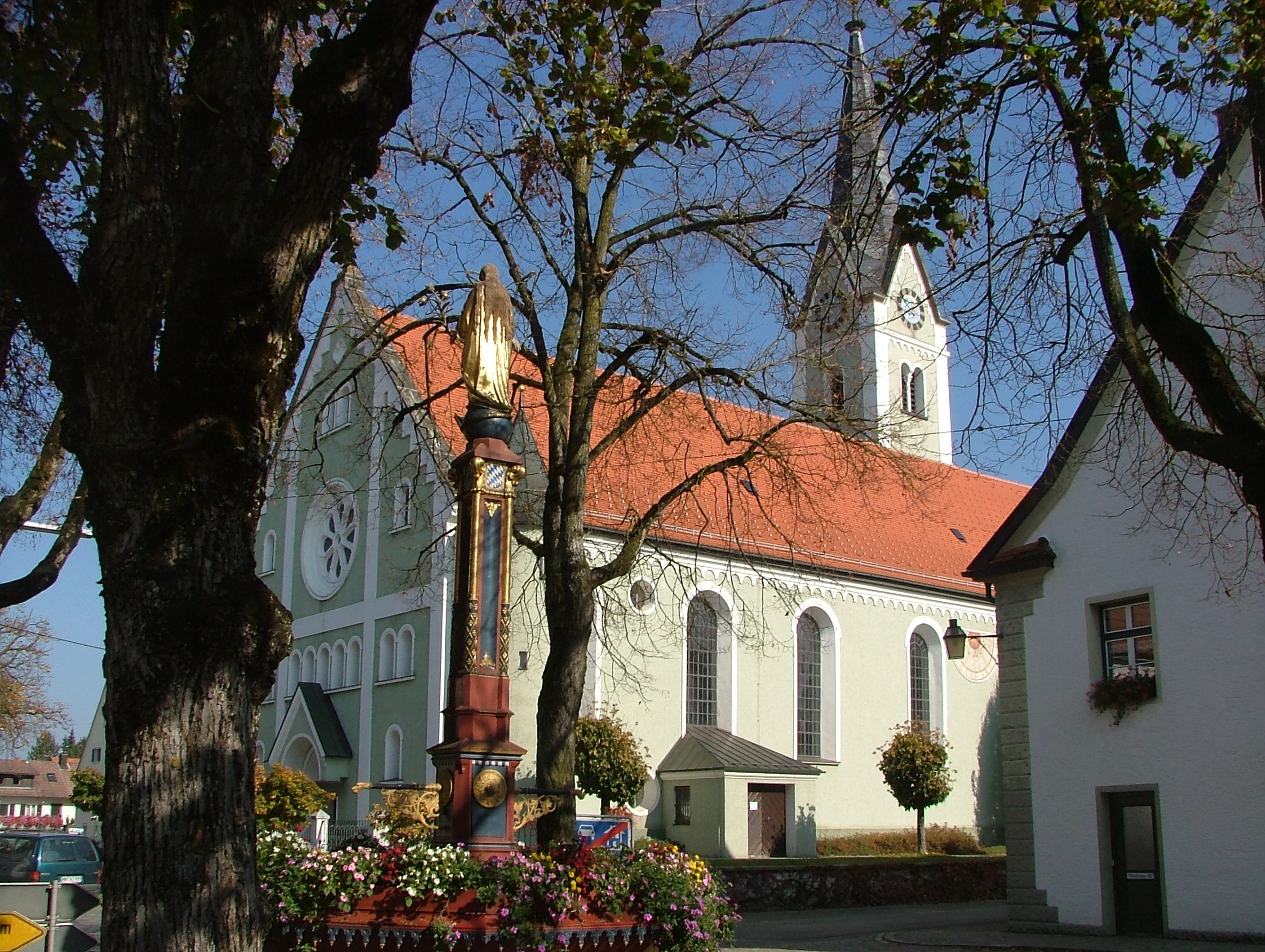 Legau